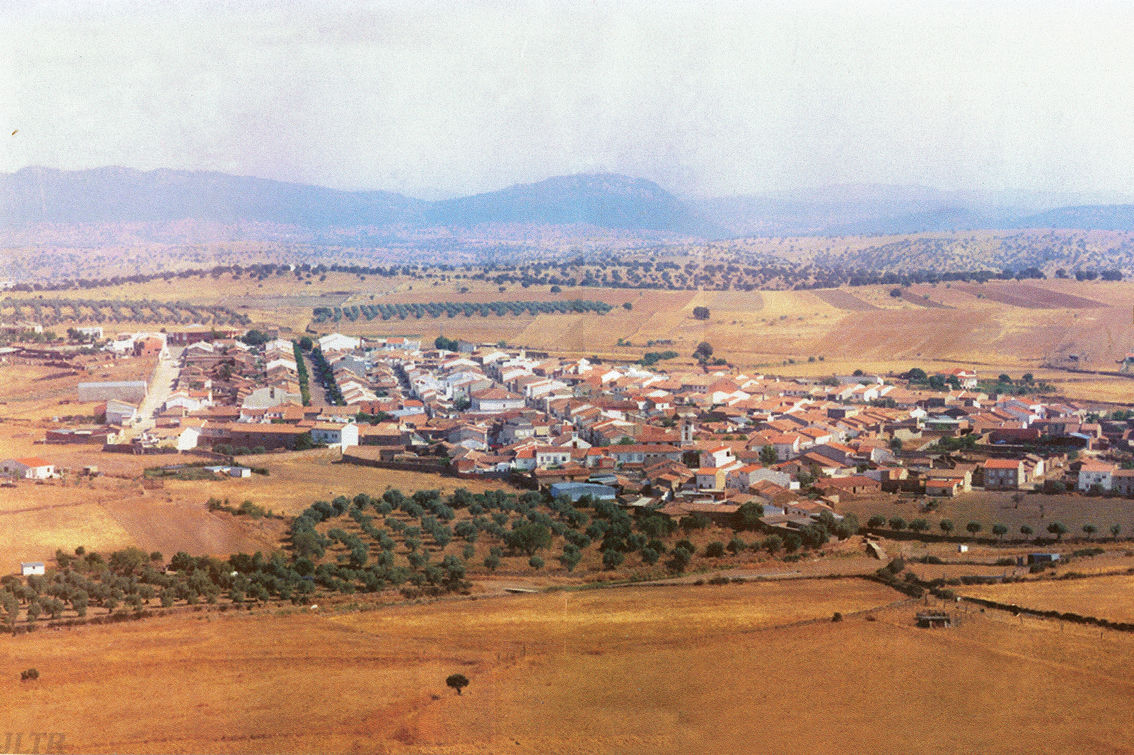 Alamillo (Ciudad Real). Vista aérea.